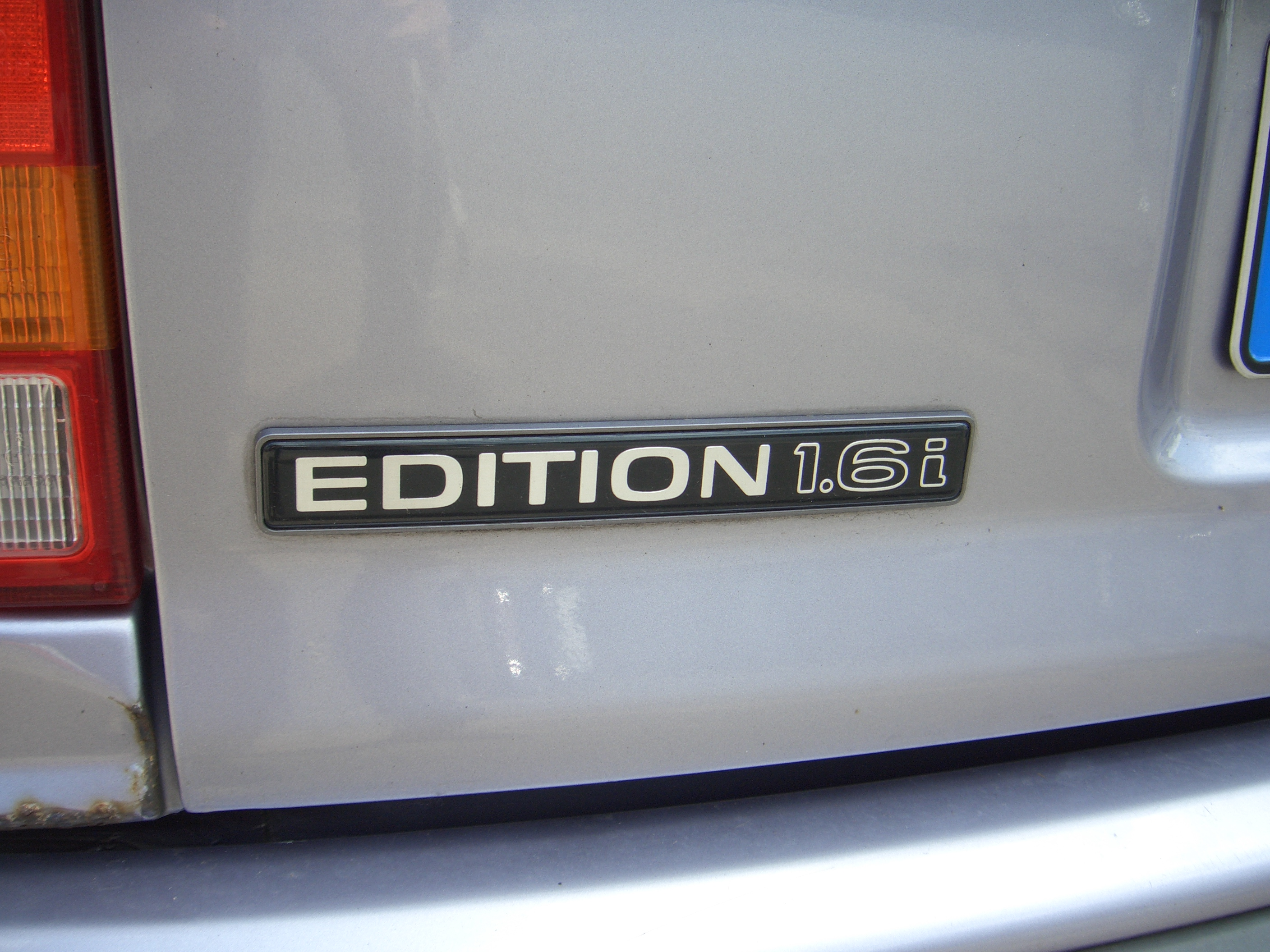 Opel Kadett E Cabrio, 1984-1991, special edition SNOW, bonnet left